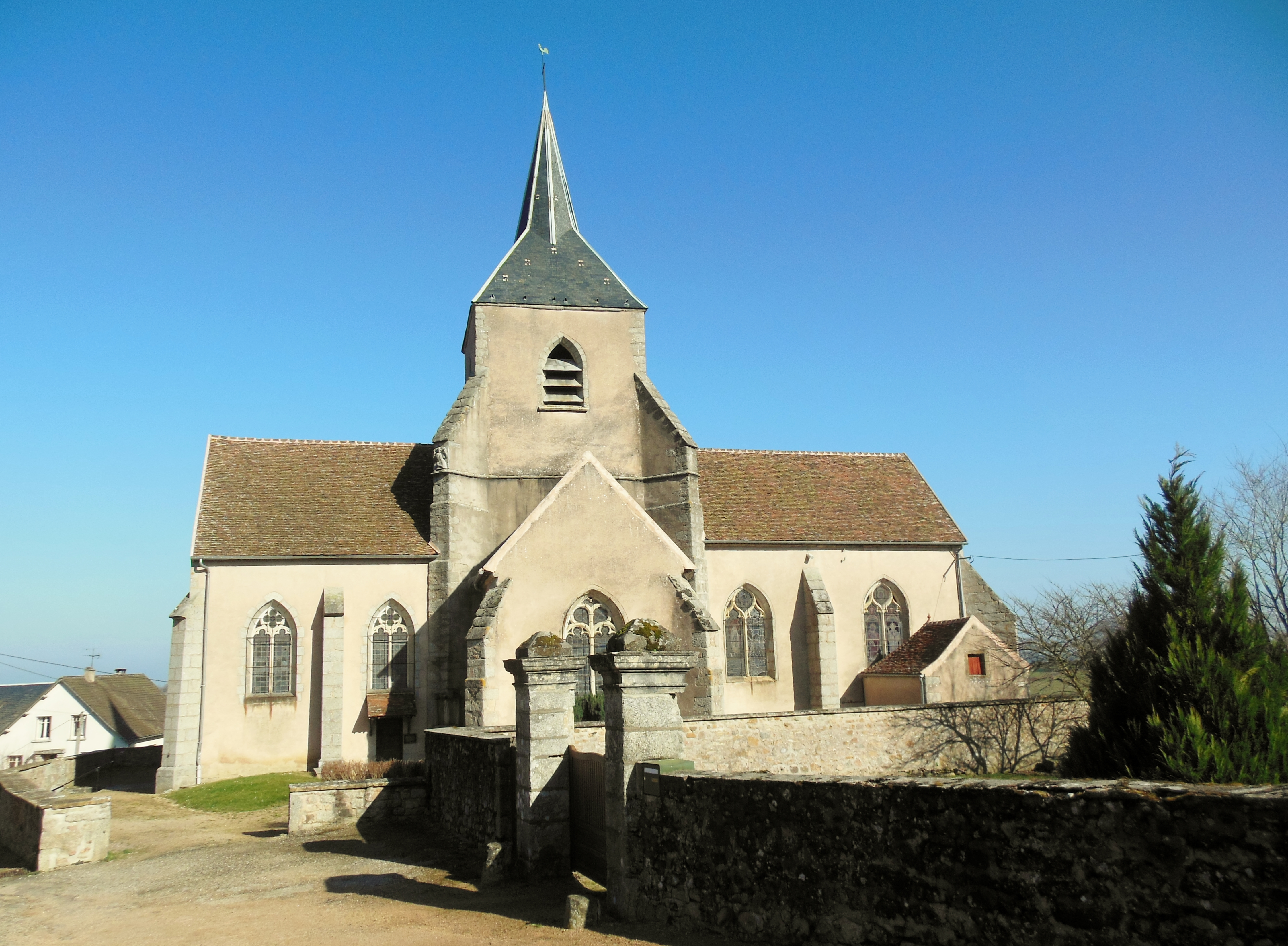 Eglise Saint-Léger de Saint-Léger-Vauban, Yonne.